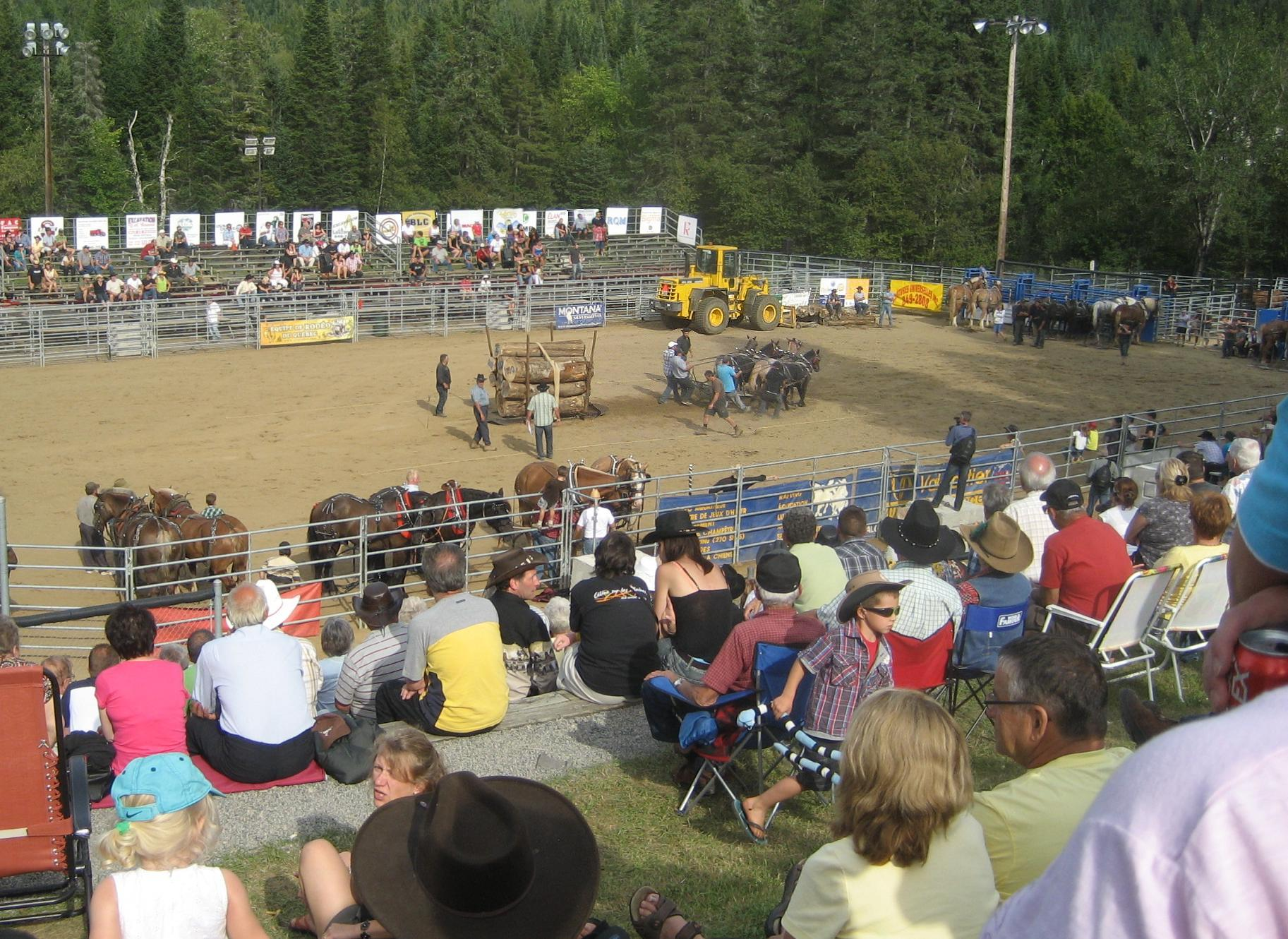 Tire de chevaux à la Virée Country 2010 à Stoneham Qc Canada